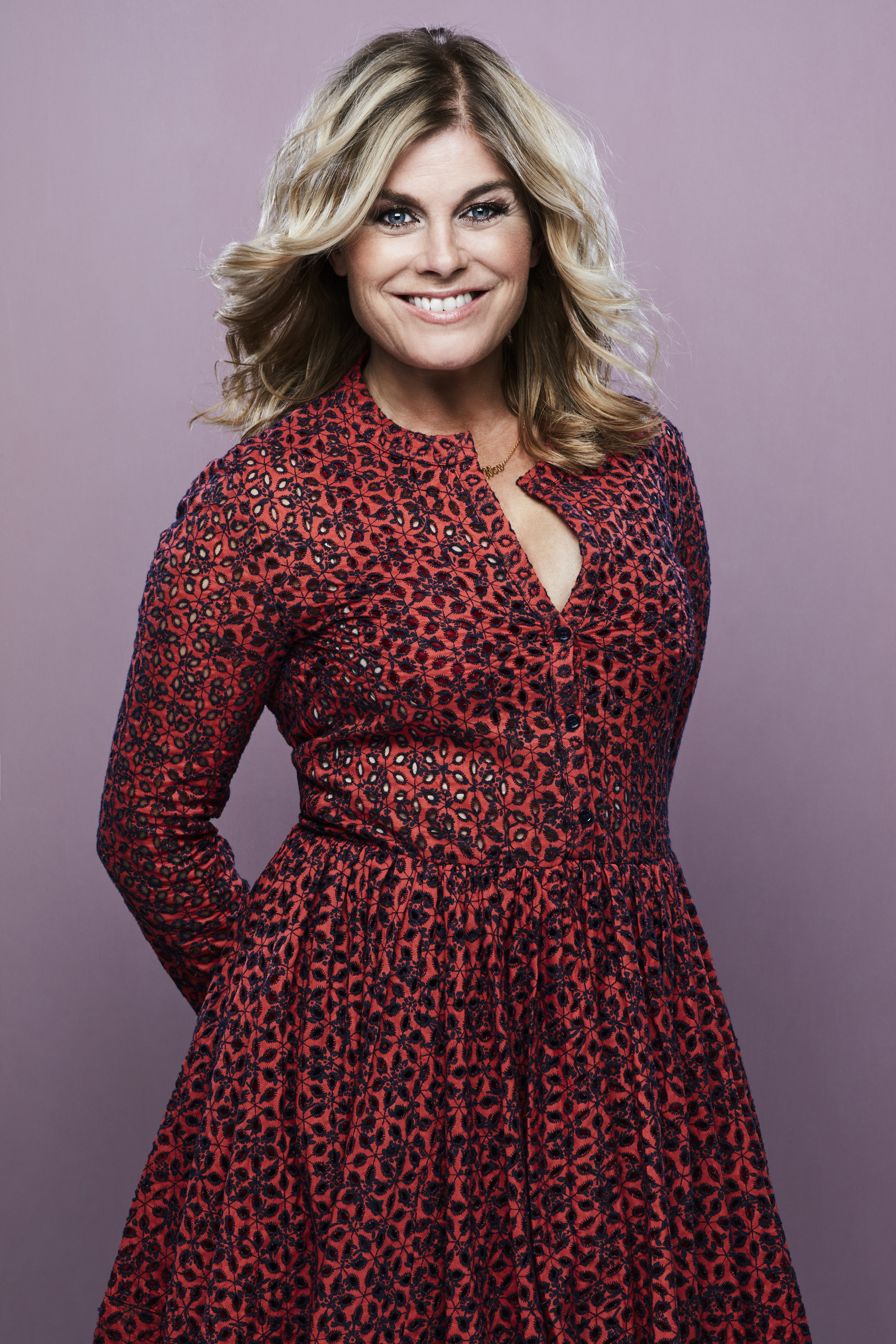 Sångerskan Pernilla Wahlgren.